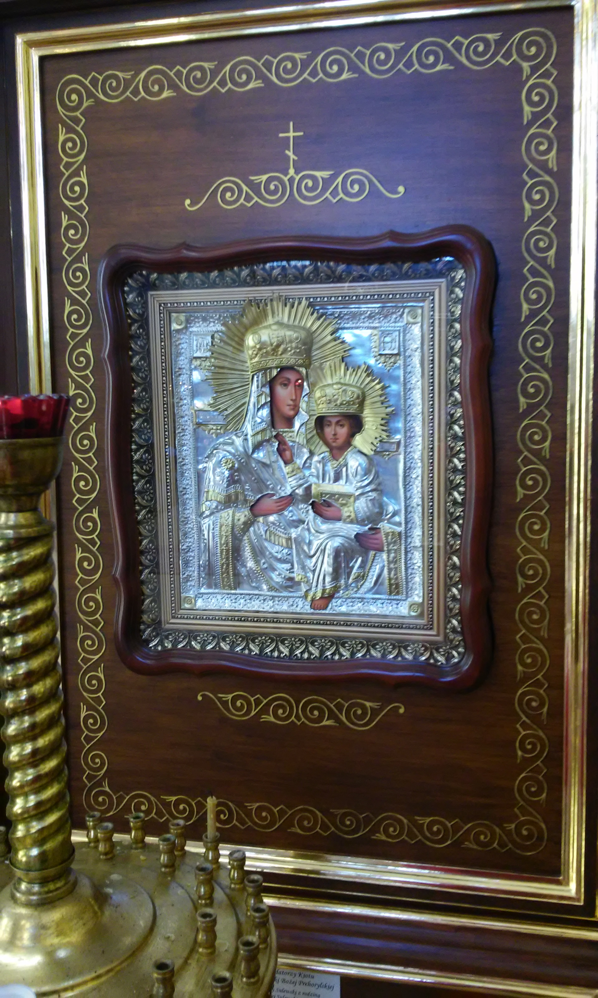 Kopia cudotwórczej Prehoryłskiej Ikony Matki Bożej w cerkwi w Dołhobyczowie (przeniesiona na czas remontu z Hrubieszowa)